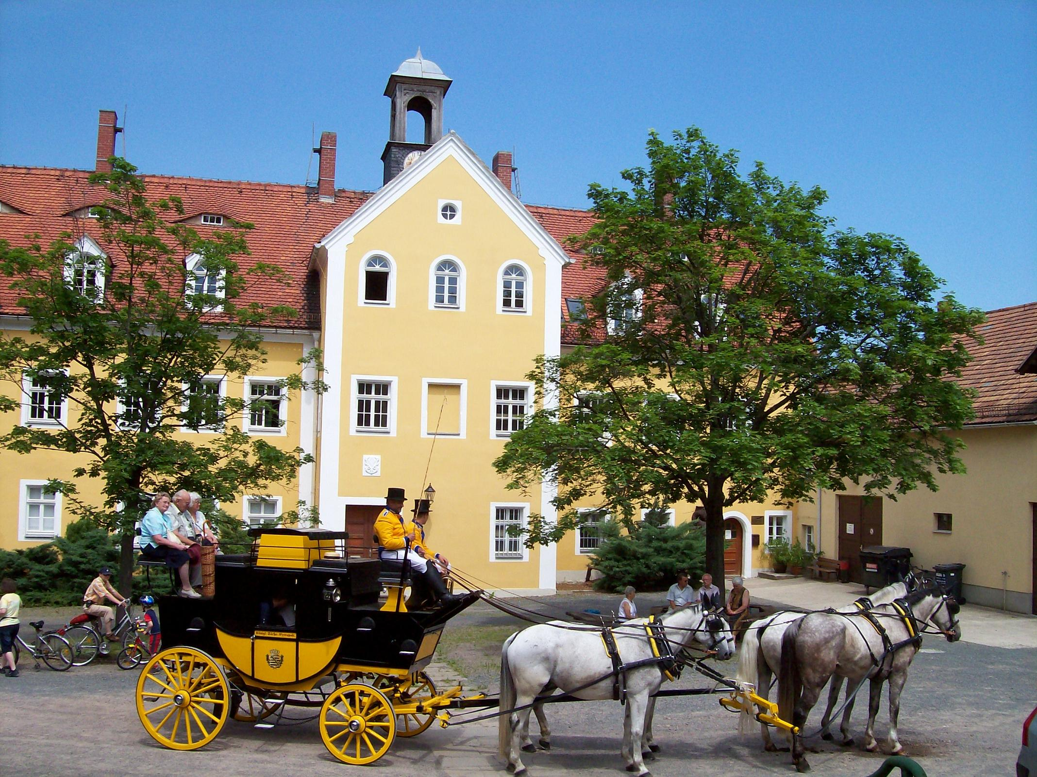 Postkutsche im Schlosshof Grillenburg